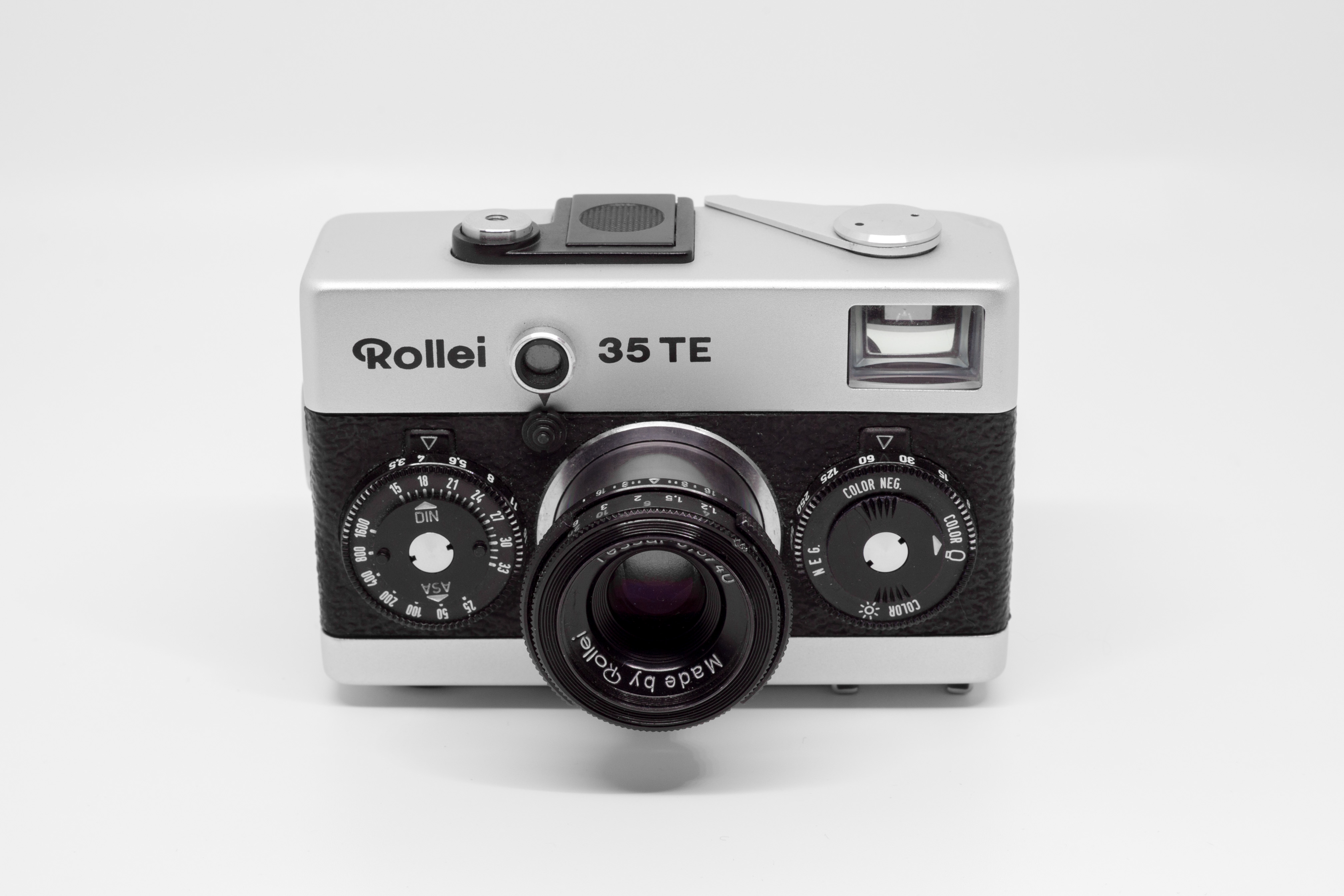 35mm camera Rollei 35TE rangefinder.